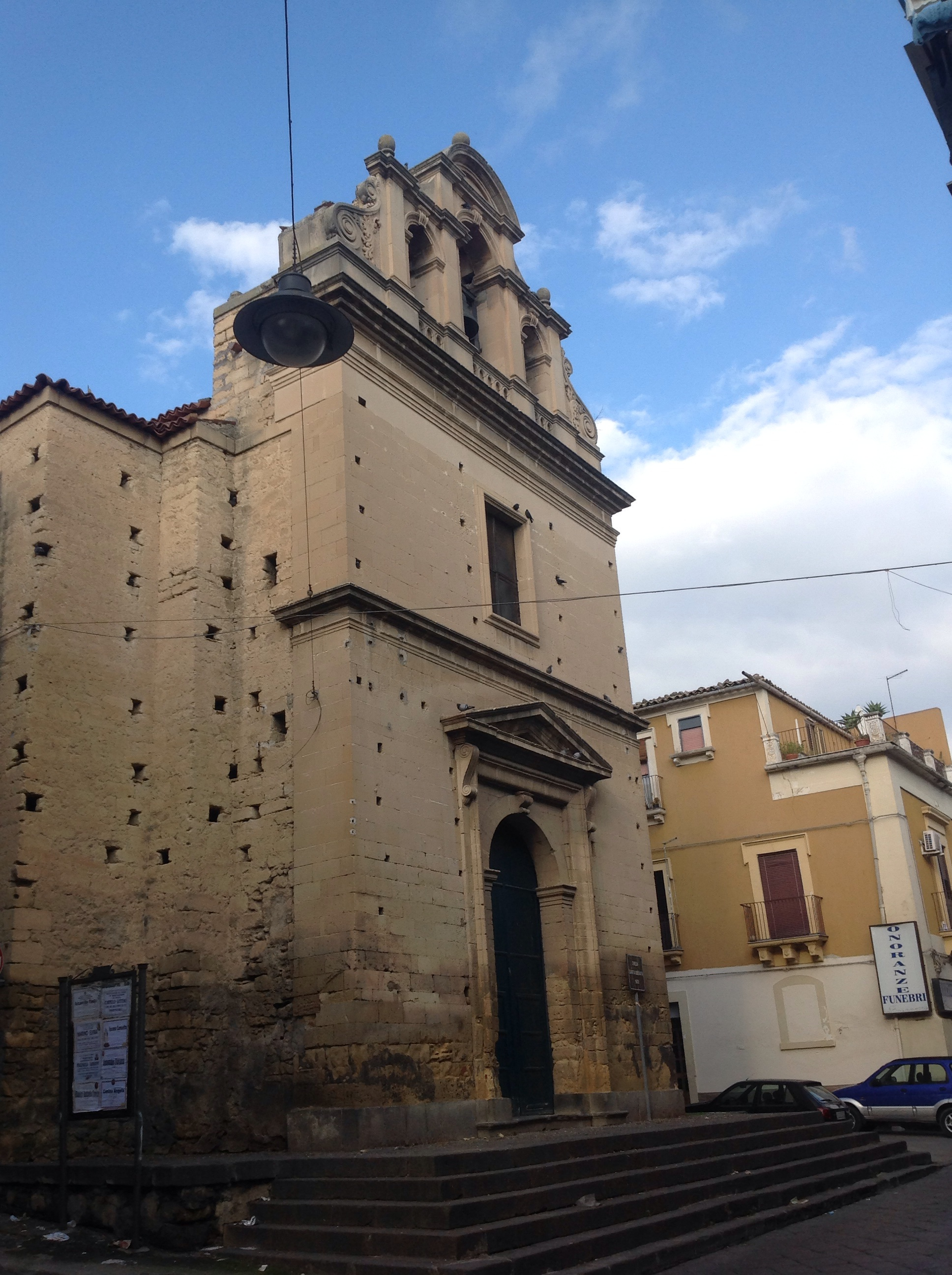 Autore: Francesco Amato Fonte: opera propria Data: dicembre 2013 Descrizione: chiesa di si liberata a Scordia